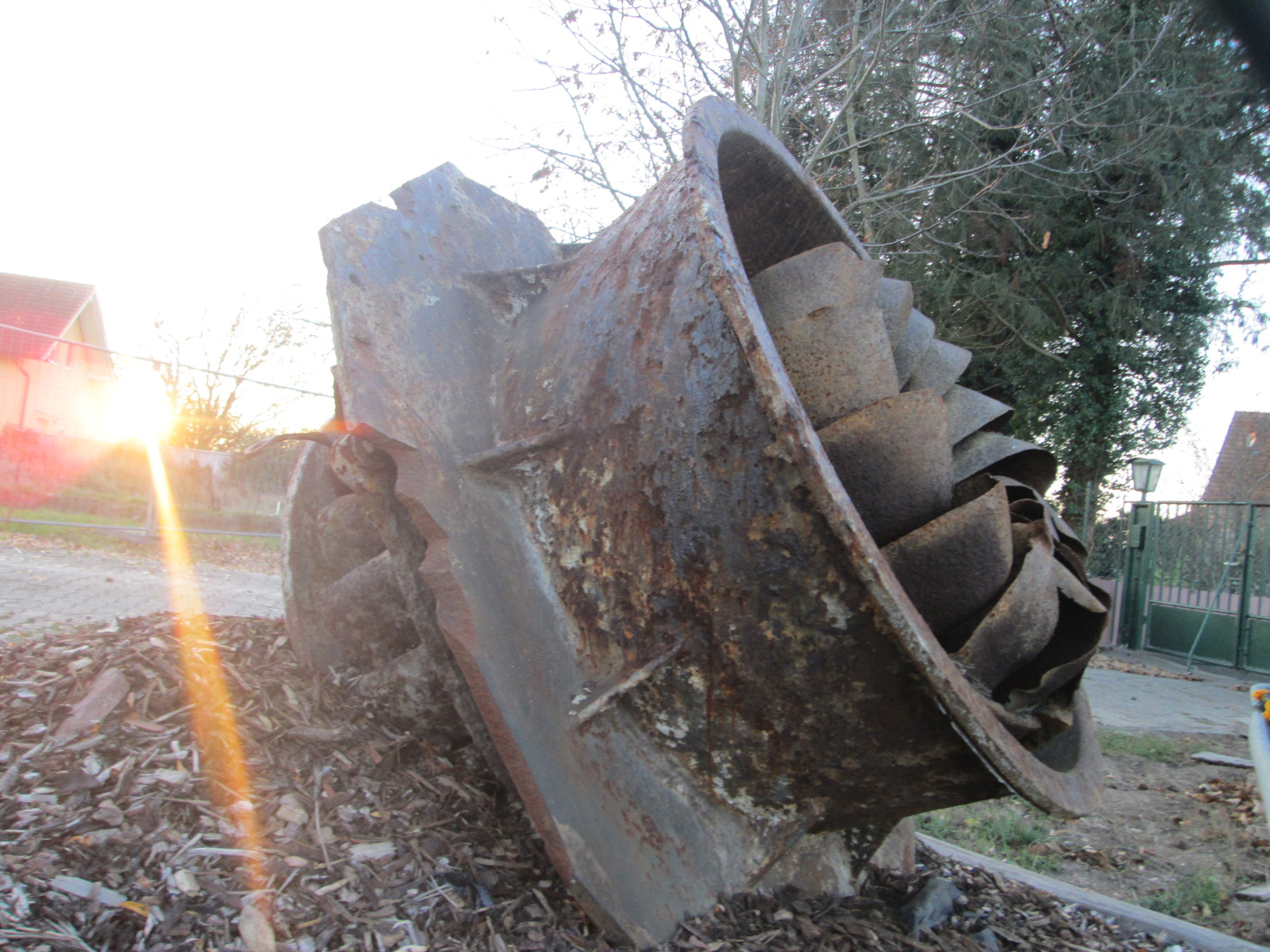 Francis-Schacht-Turbine auf dem Gelände der ehem. Burg Wersau bei Reilingen - dieser 1849 entwickelte Turbinentyp wurde auf der Schlossmühle bis 1956 eingesetzt